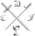 cape club logo